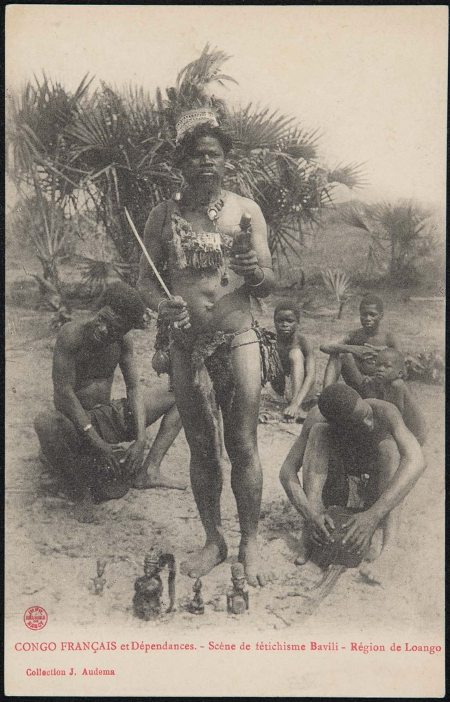 Les féticheurs Nganga Kissi étaient les détenteurs de la spirtualité et de la musique des Bavili. Un batteur de tam-tam et un joueur d'instrument à cordes accompagnent le féticheur.